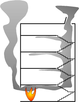 Effet bénéfique d'une ouverture haute empêchant l'accumulation de fumées lors d'un incendie Beneficial effect of an opening on the top against a smoke accumulation Auteur/author: Christophe Dang Ngoc Chan (cdang)